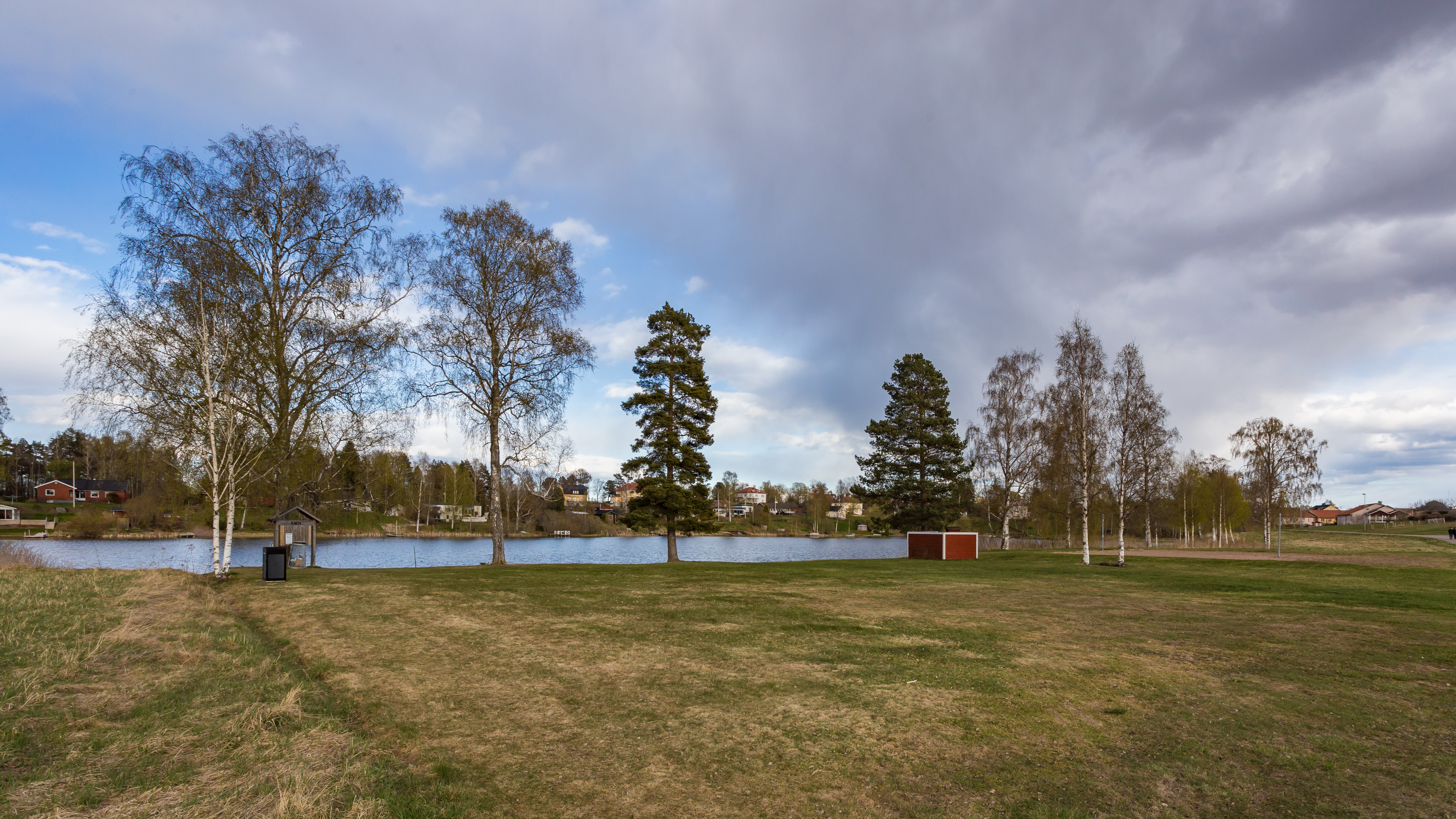 Munkenbadet vid Munkbosjön (Munken), Hedemora, Dalarnas län, Sverige.